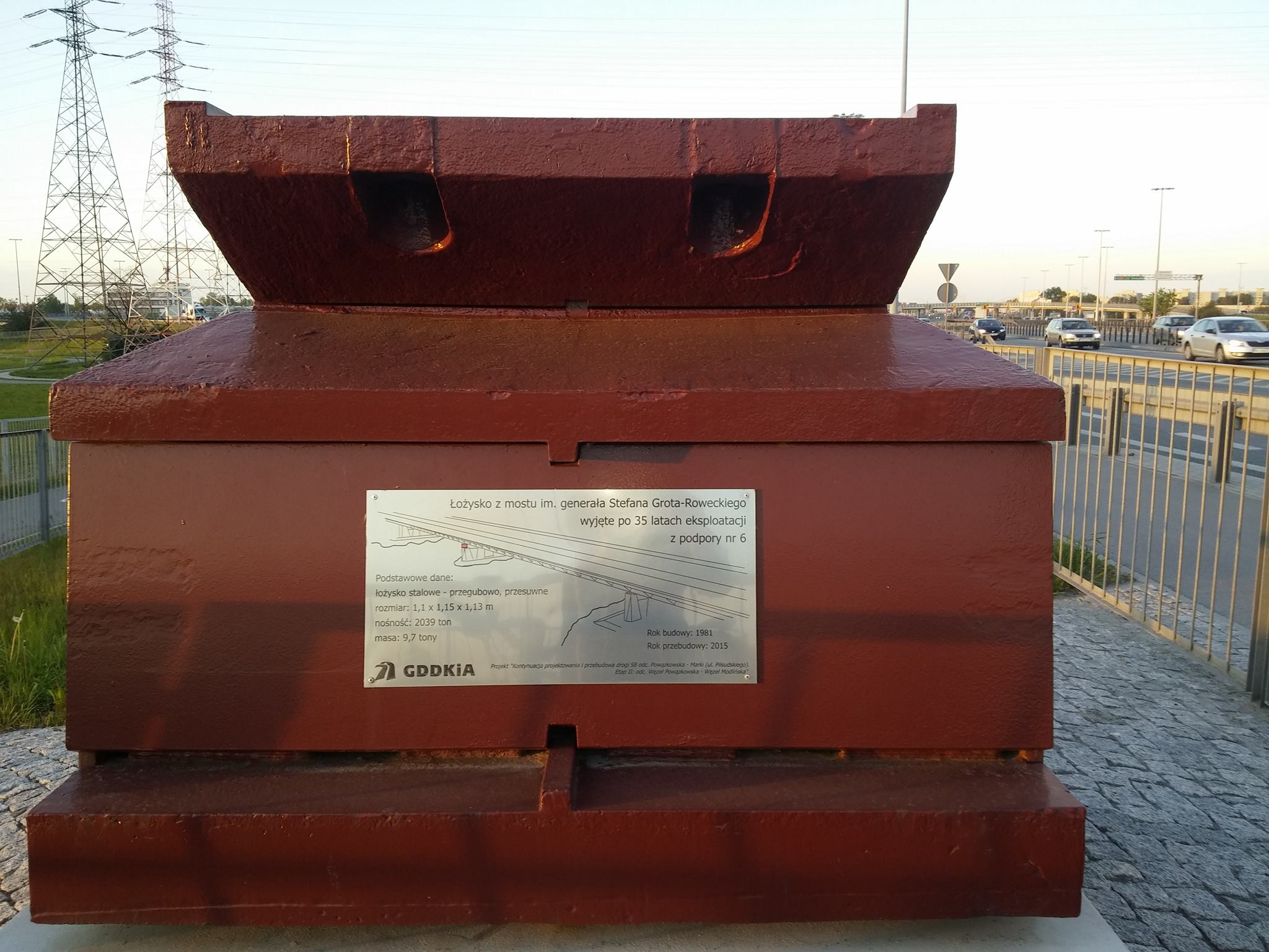 Łożysko z Mostu Grota Roweckiego (podpora nr. 6) wyjęte po 35 latach eksploatacji